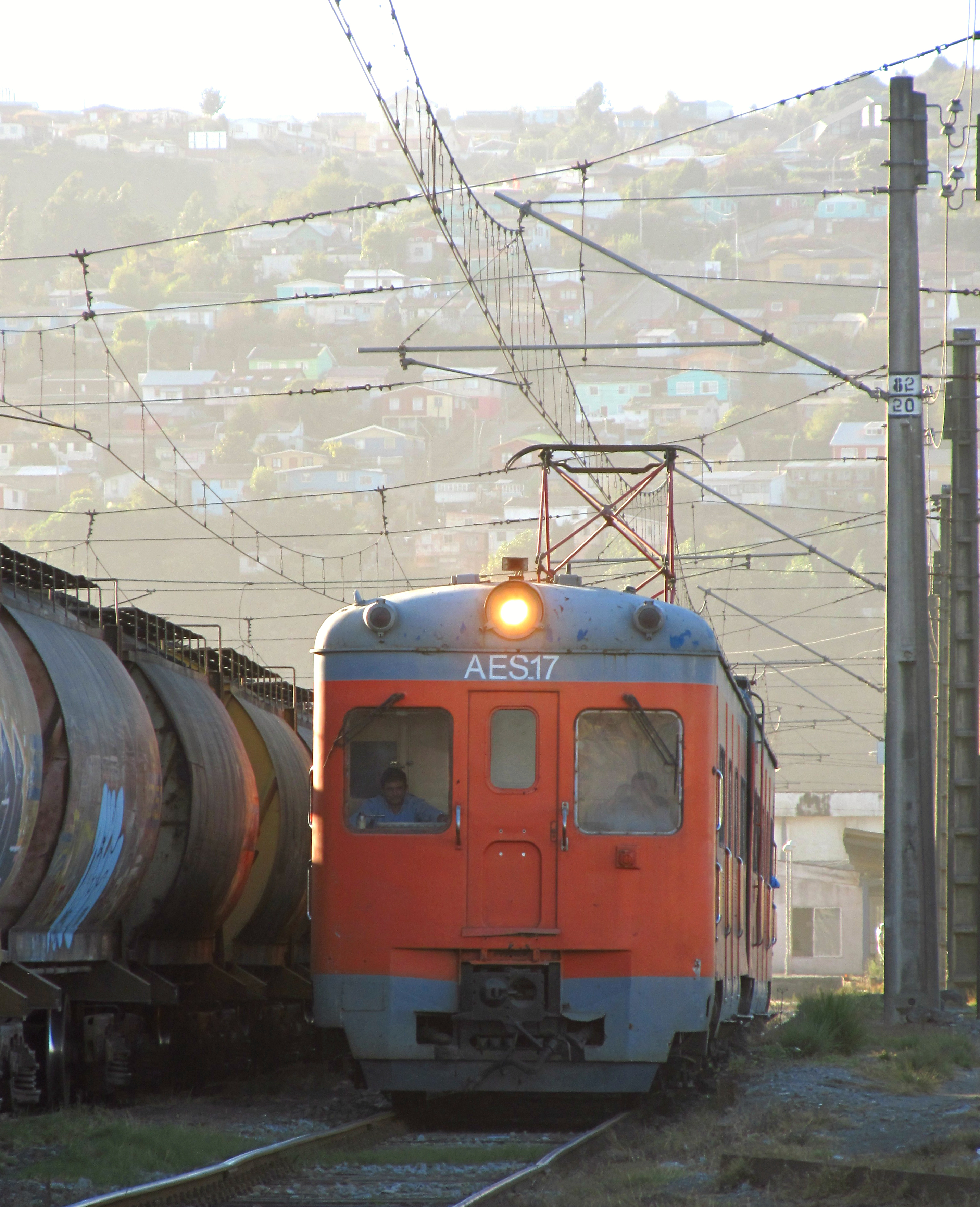 El AES-17 saliendo de El Arenal.